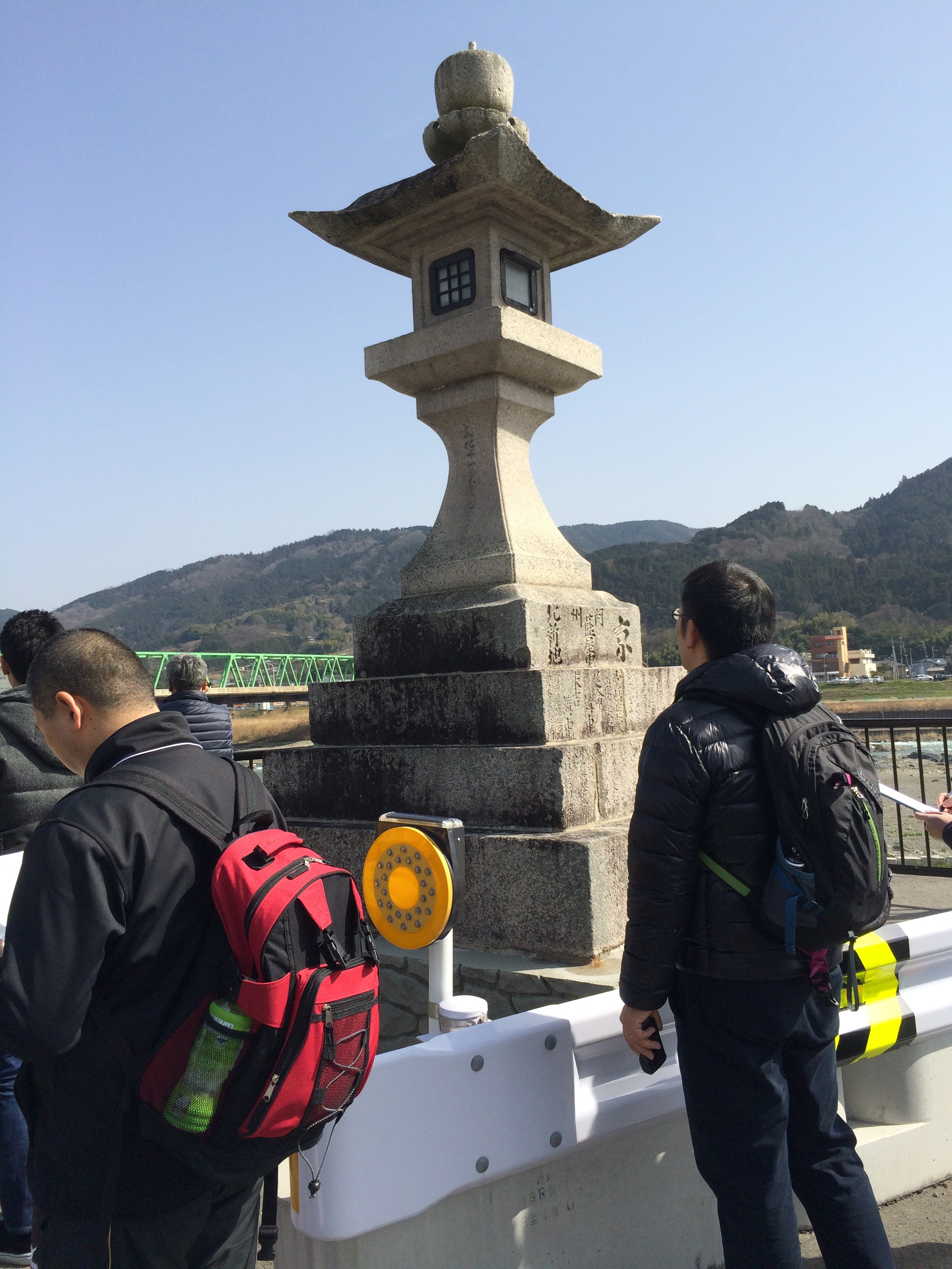 橋本市東家の大灯篭